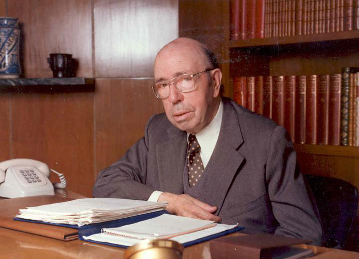 Dr. Antonio Esteve Subirana